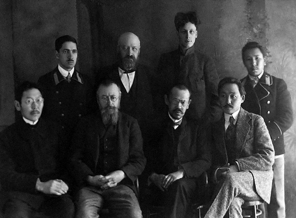 Члены Сибирской областной Думы от Якутии. Фото 1917. Сидят (слева направо): М. Н. Тимофеев-Терешкин, П. А. Куликовский, И. Н. Эверстов, Г. В. Ксенофонтов; стоят: И. С. Бланков, М. В. Сабунаев, неизвестный, Н. Желобцов